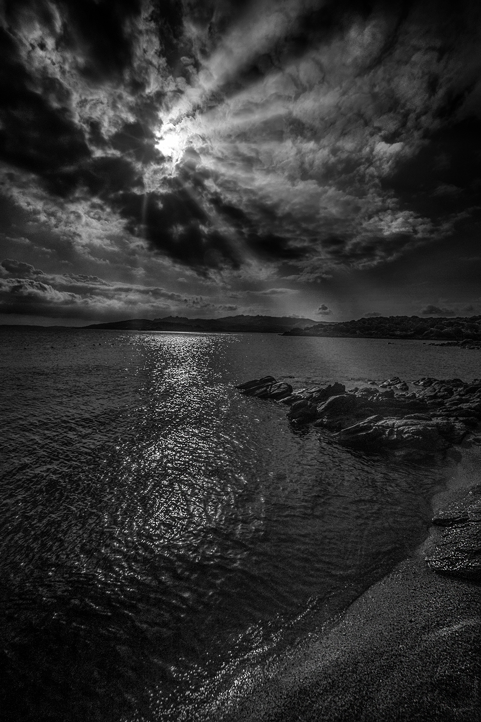 Immagine di Marco Fodde